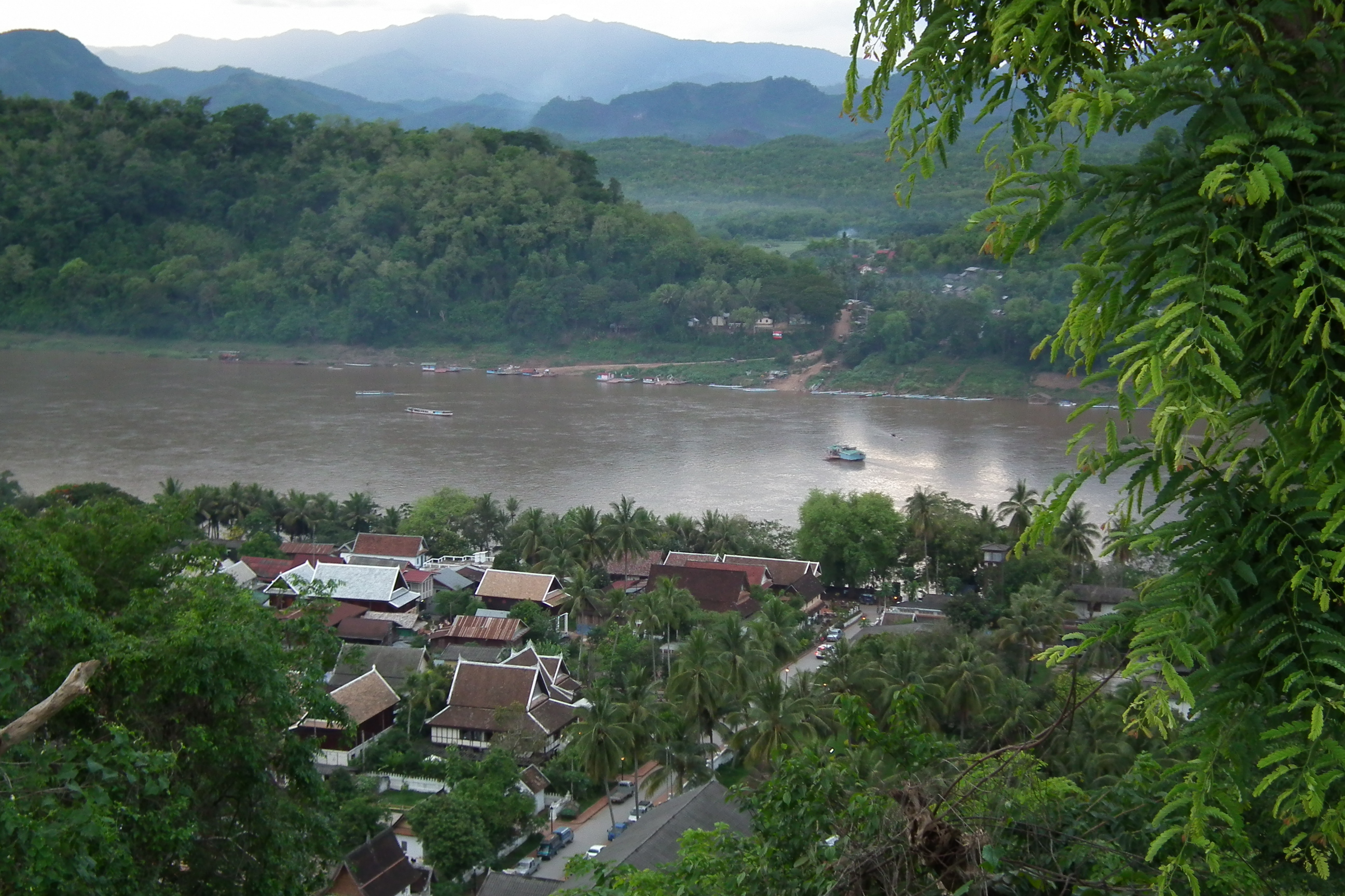 Phou si Luang Prabang Laos プーシーの丘 ラオス・ルアンプラバーン